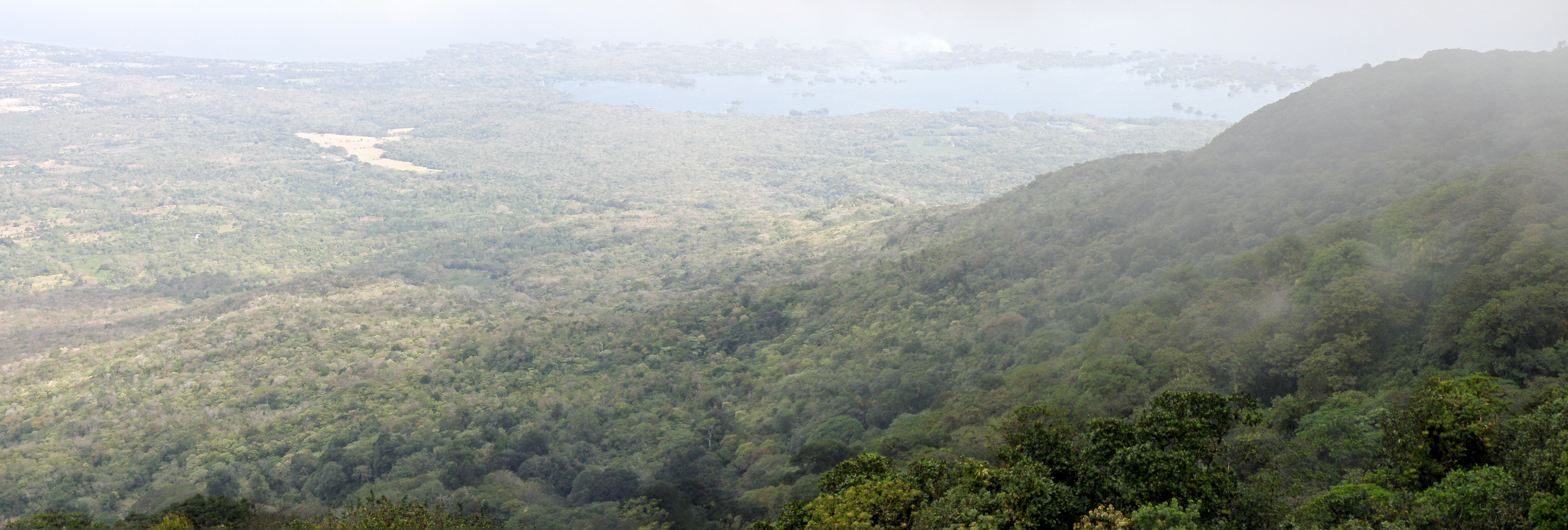 Vue sur la péninsule d'Asese depuis le Mombacho, un volcan endormi avec deux cratères recouverts d'une épaisse végétation typique des forêts des nuages.